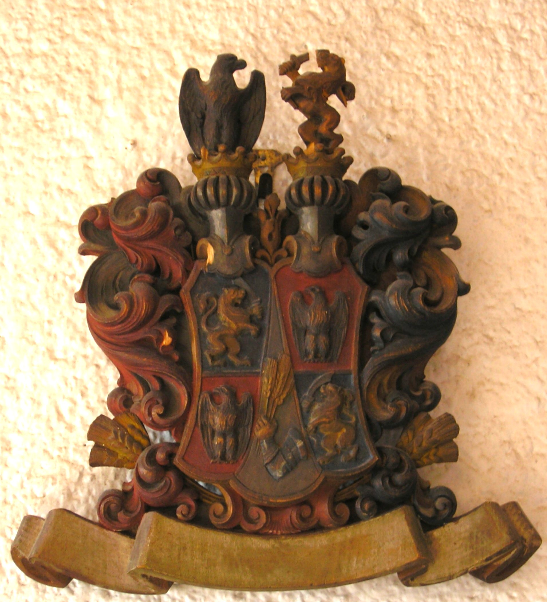 Rimanóczy-címer fából faragva és színezve